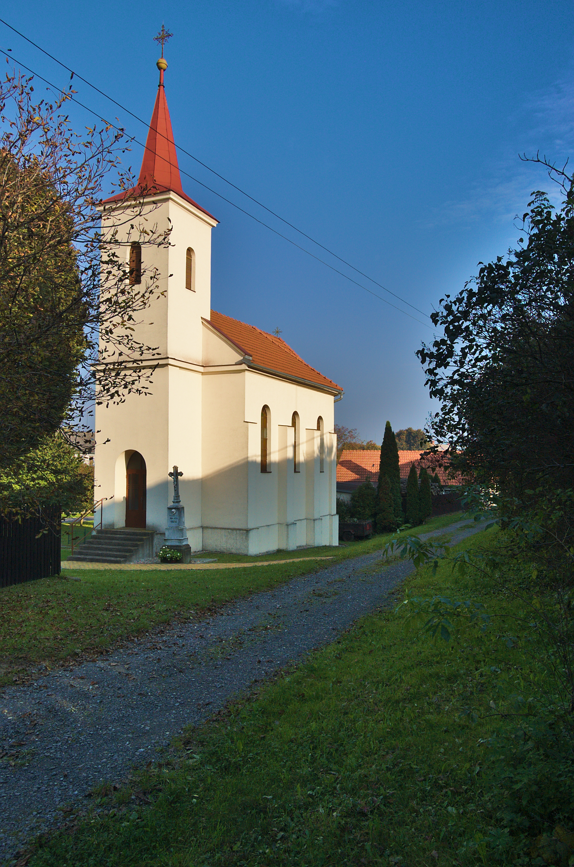 Kaple svaté Anny, Budětsko, okres Prostějov